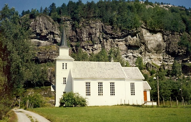 Nordal kyrkje